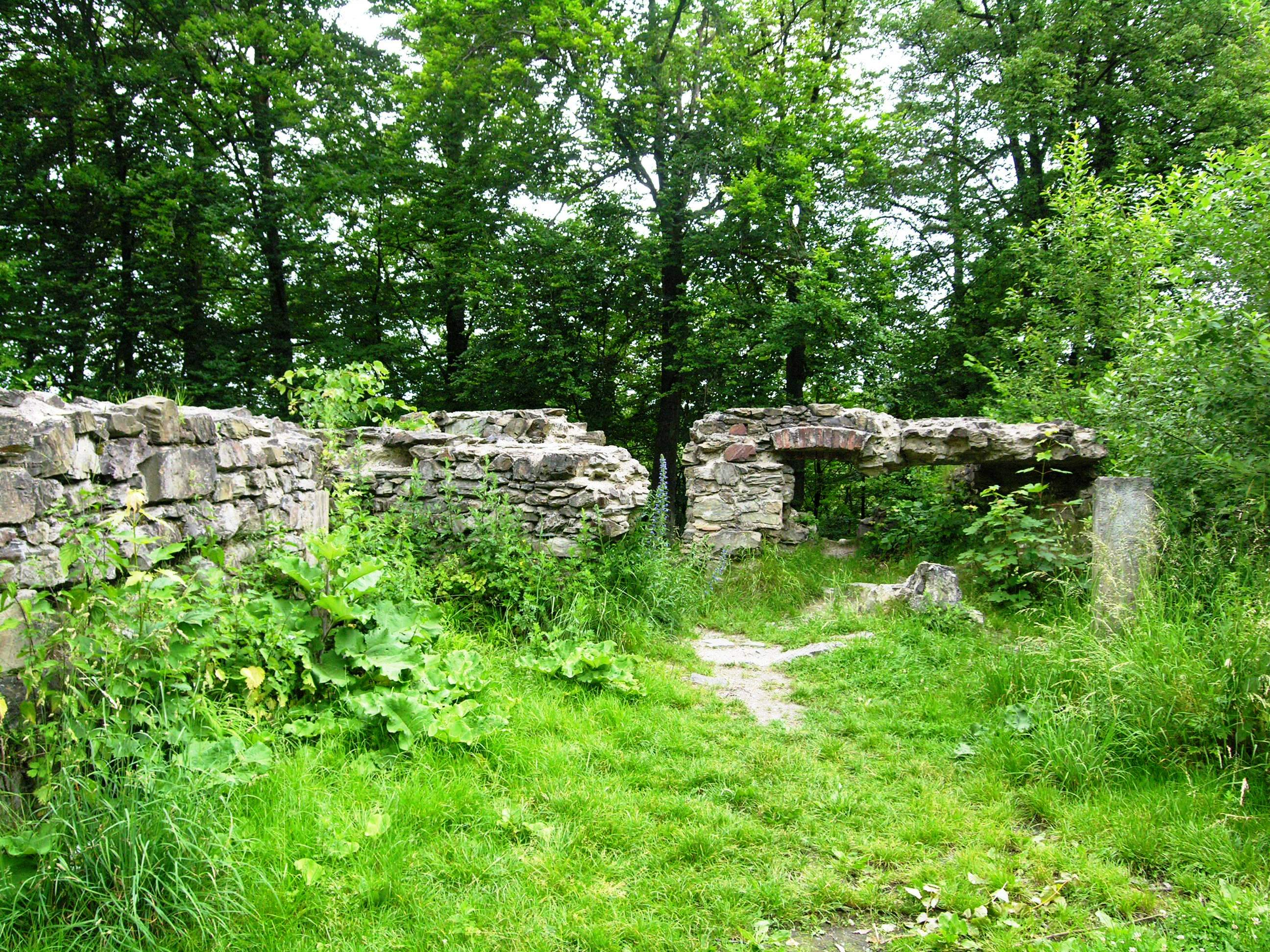 Klášter kartouzský Vallis Josaphat, zřícenina (Dolany), SV od obce, nad levým břehem Dolanského potoka, Dolany